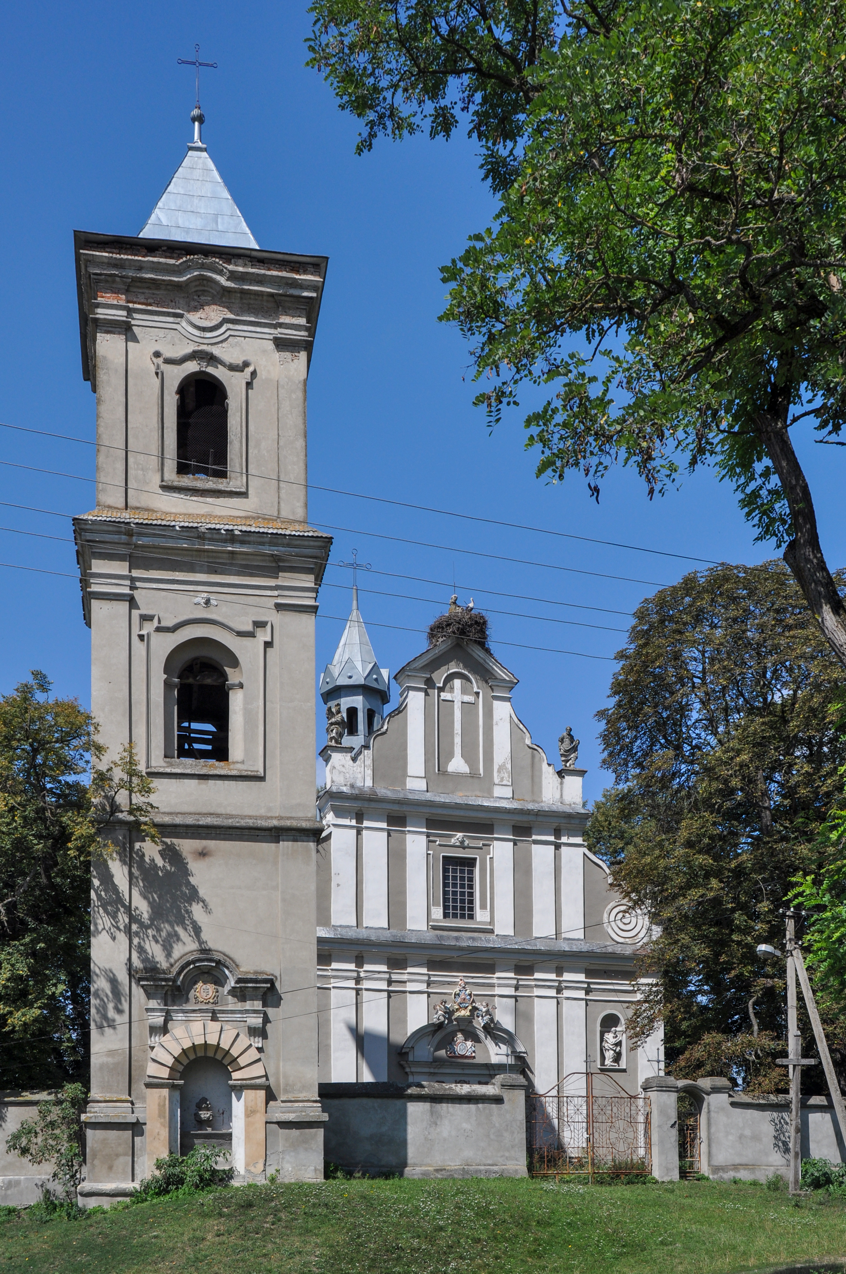 Костел і дзвіниця(мур.), село Устя-Зелене